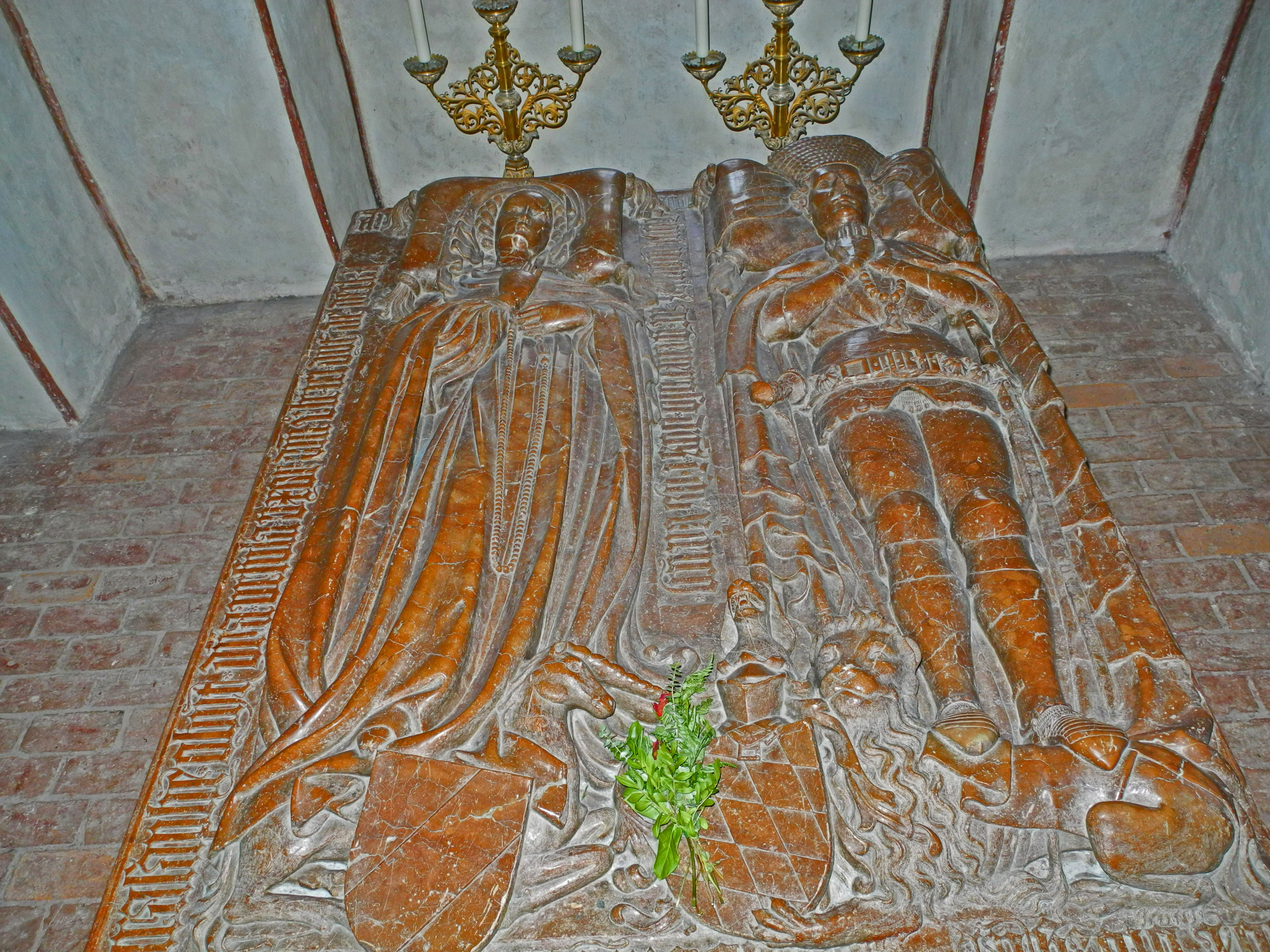 Stadtpfarrkirche St. Stephan in Mindelheim; Rotmarmorplatte für Herzog Ulrich von Teck, +1432, und seine 2. Gemahlin Ursula, geb. von Baden, +1429, auf neuerer Tumba im Turm-Erdgeschoß aufgestellt